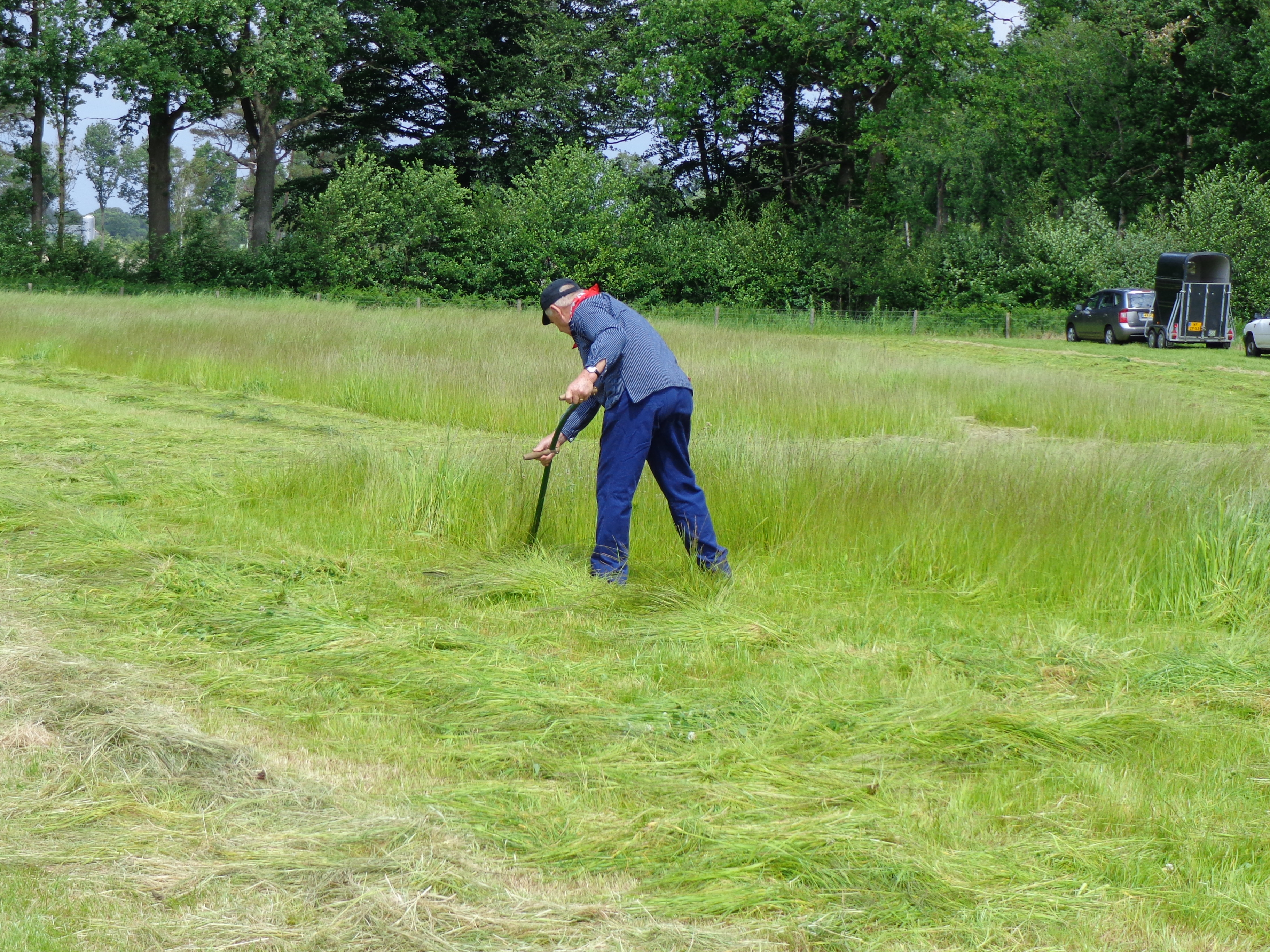 Grasmaaien met een Zeis tijdens Hooidag te Groot Zandbrink